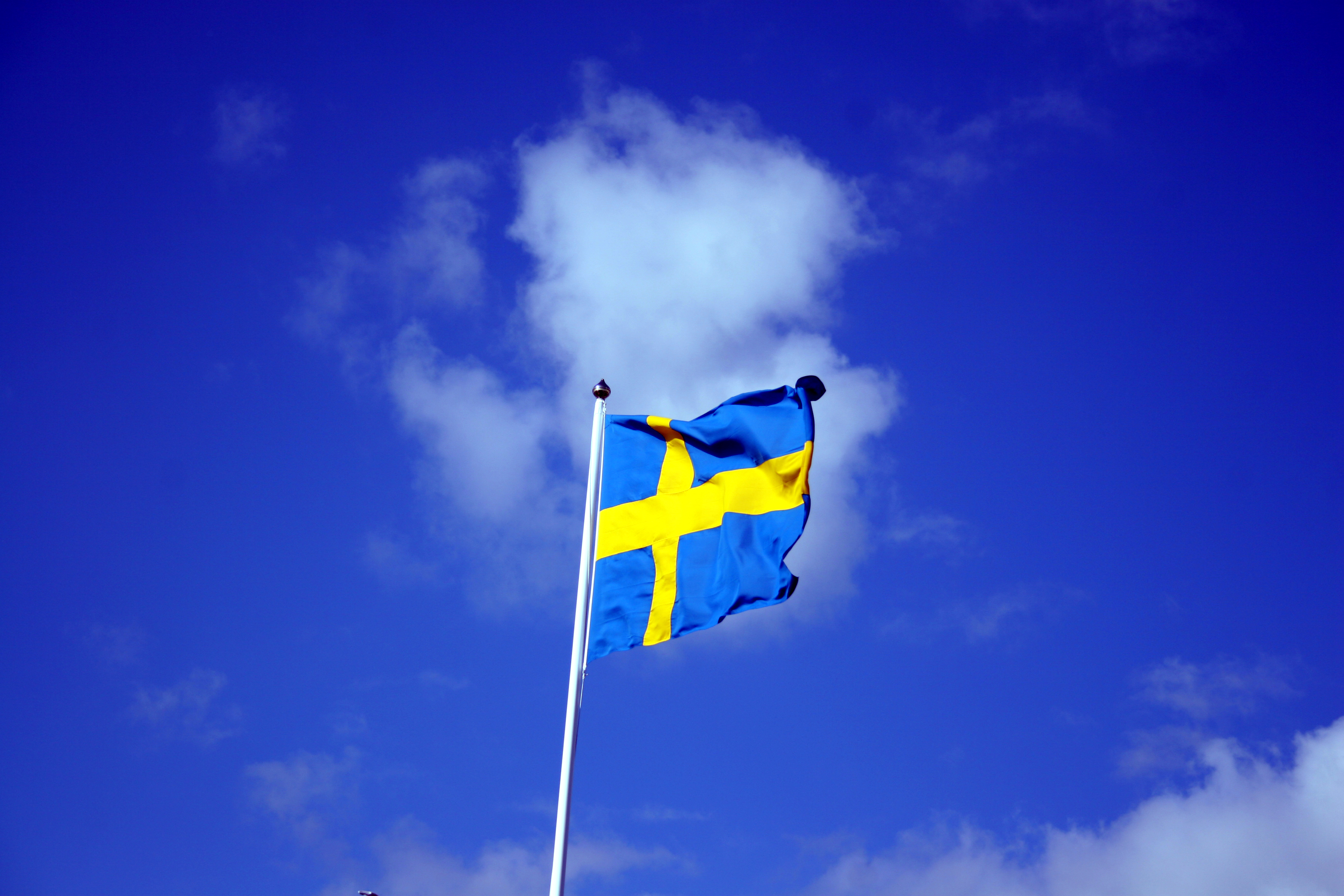 Swedish flag.